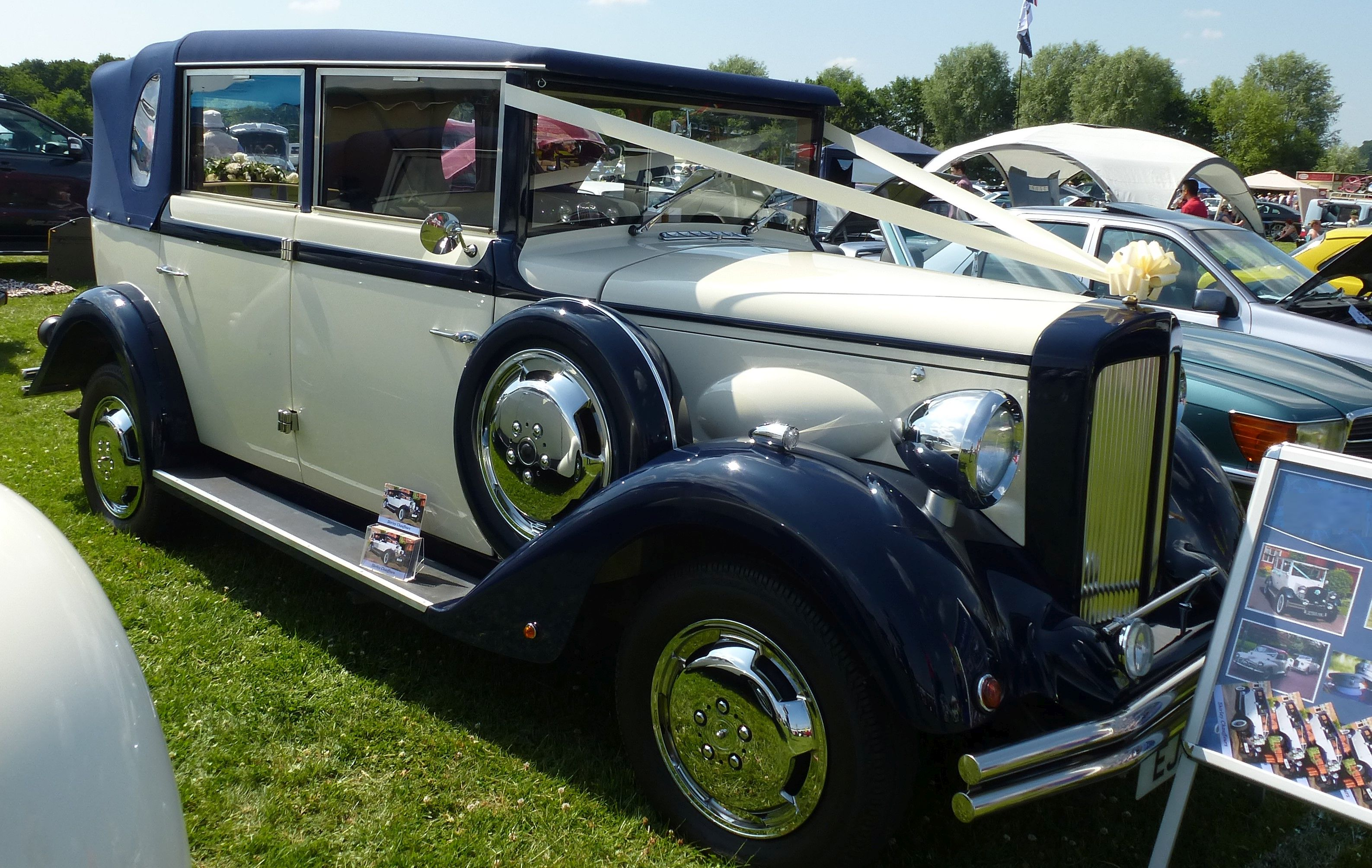 Regent Landaulet 1991